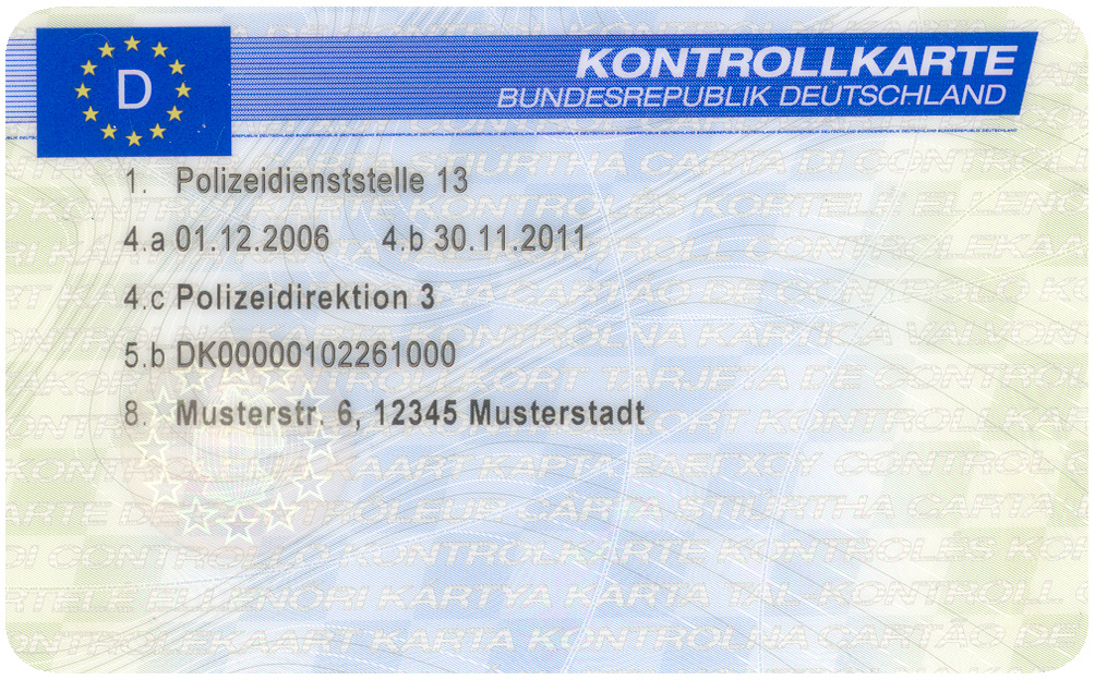 Muster einer deutschen Kontrollkarte für das Kontrollgerät im Straßenverkehr gemäß Verordnung (EG) Nr. 2135/98, Vorderseite